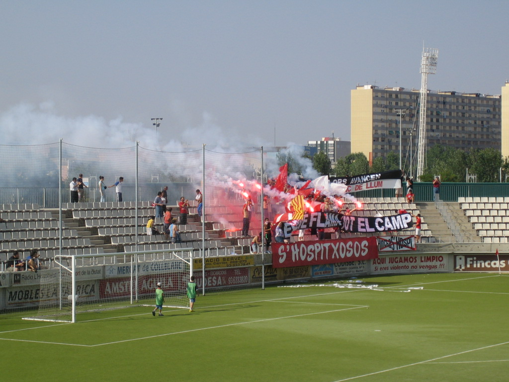 Foto hecha por mi desde el estadio de la Feixa Llarga en horizontal hacia el norte, el Domingo 26 de Junio del 2005 a las 16:57 de la tarde. Con la cámara CANON ixus 40